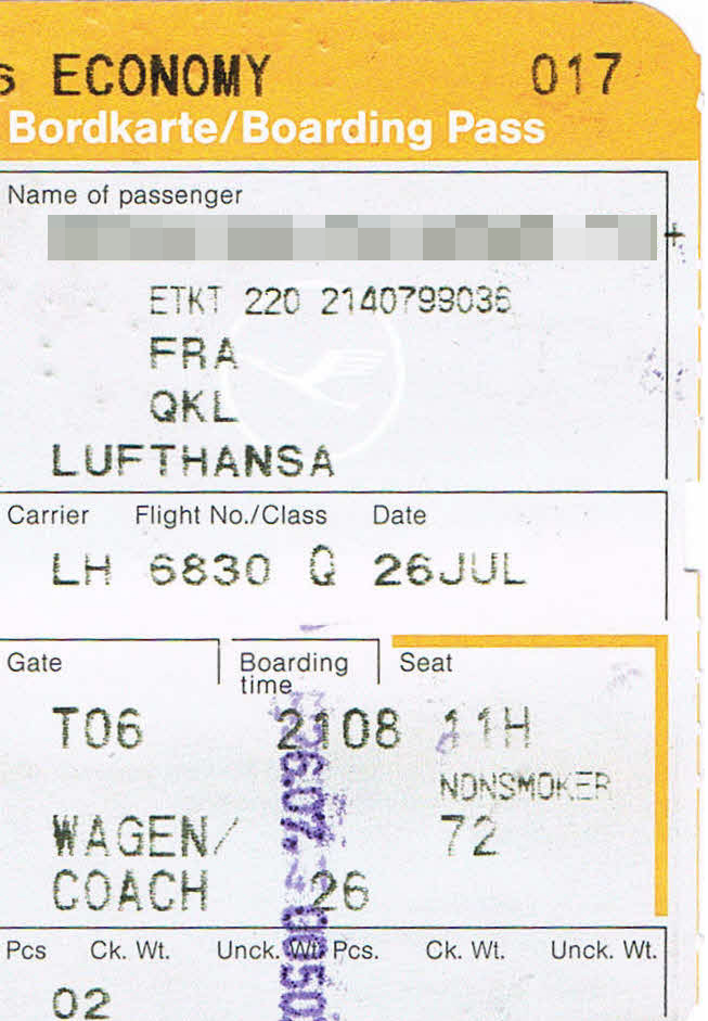 Lufthansa - AirRail-Ticket Frankfurt-Köln Hbf (QKL) - LH 6830 mit Zangenabdruck